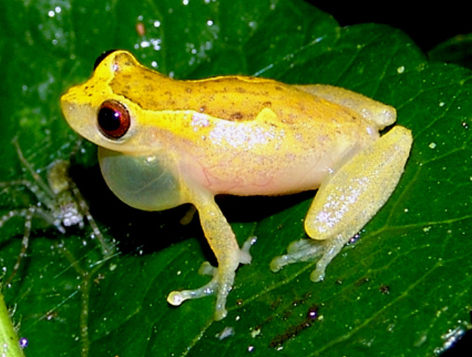 Dendropsophus decipiens